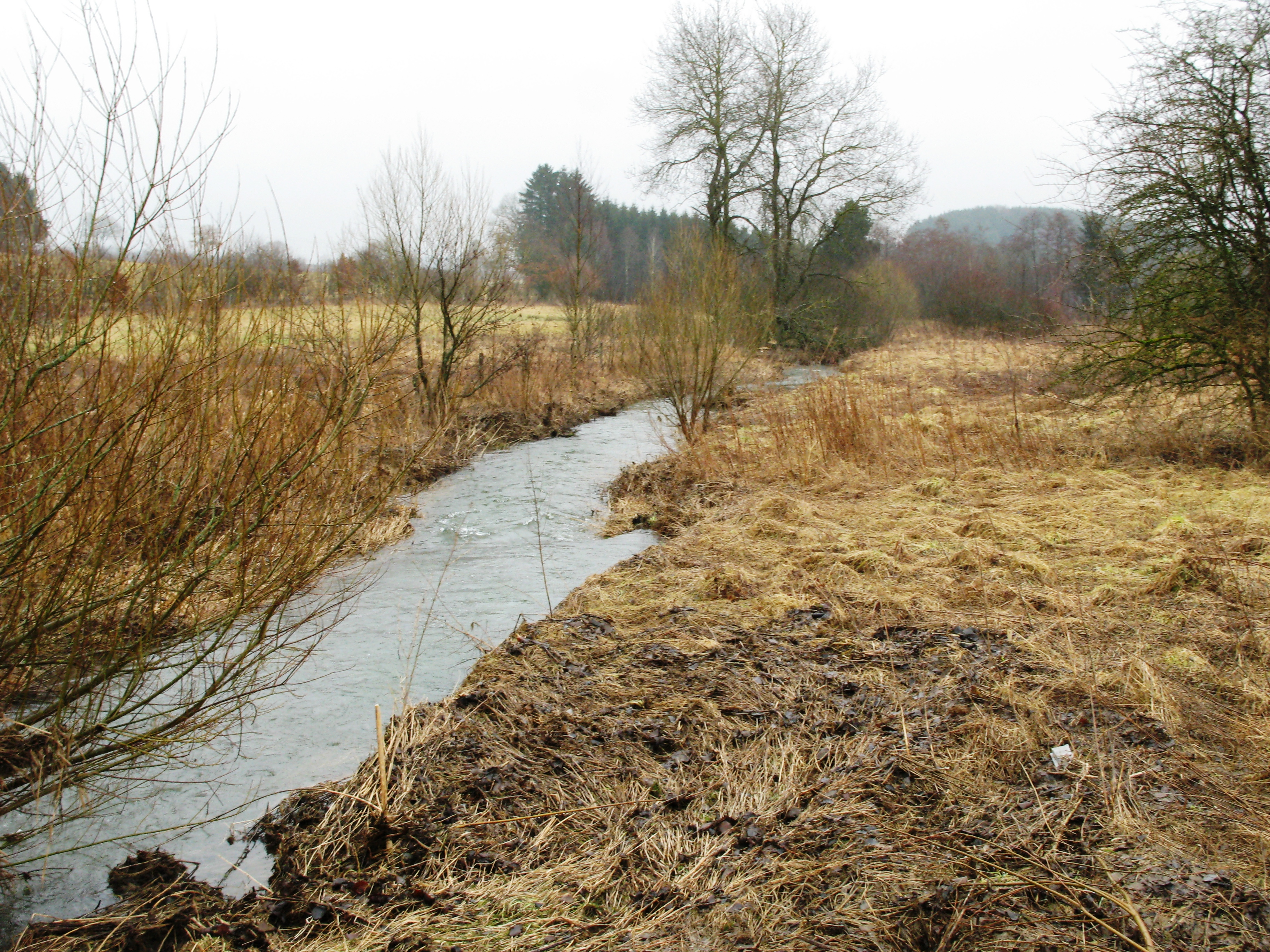 D'Wolz vun der Geisbréck gesinn eng ronn 100 Meter vum PN 52 vun der Eisebunnsstreck Lëtzebuerg-Gouvy.